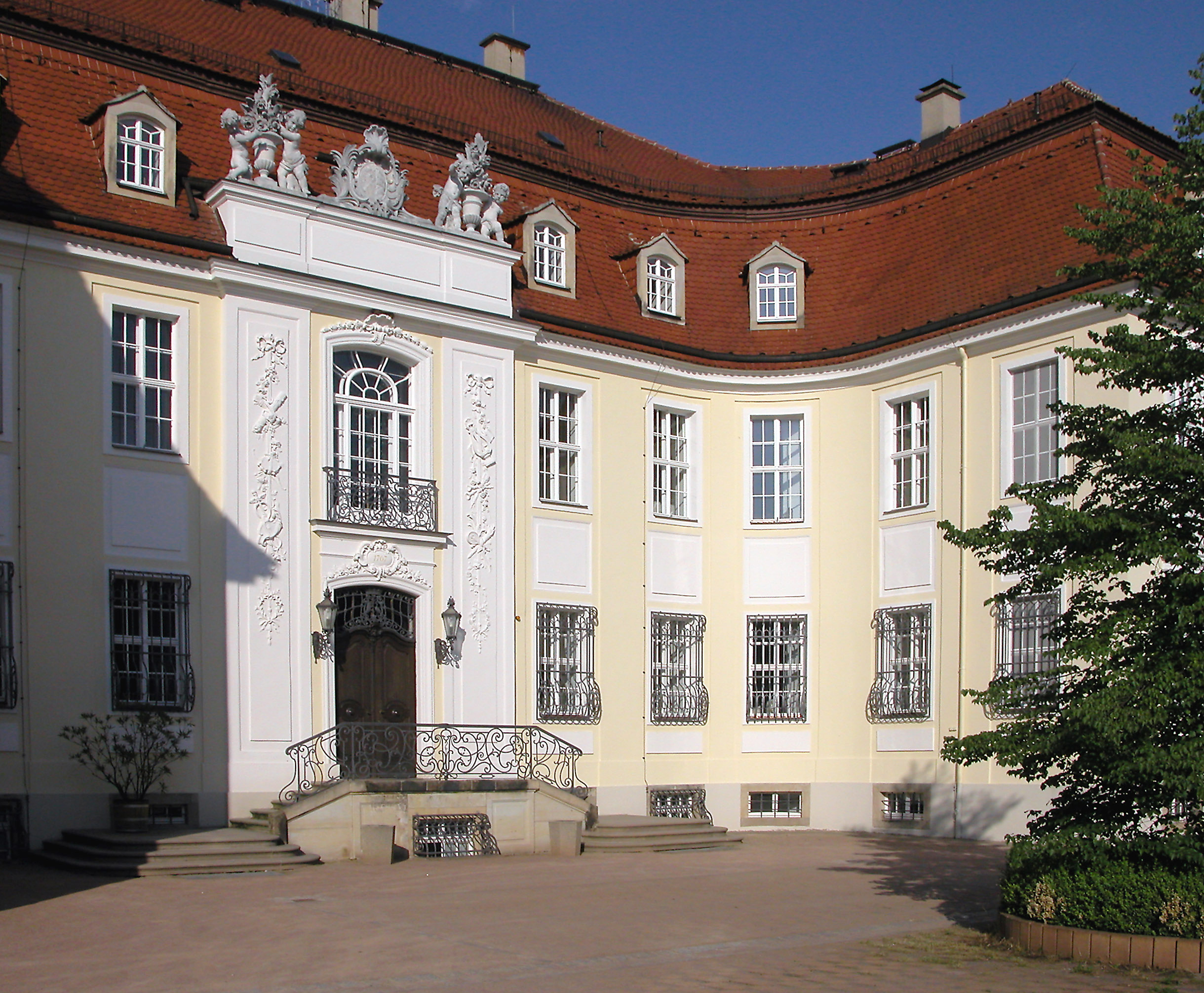 13.06.2005 01768 Reinhardtsgrimma (Glashütte), Schloßgasse 2 (GMP: 50.893047,13.757044): Schloß, Barockbau (1767) von Johann Friedrich Knöbel. Hofseite, Sicht von Westen. [DSCN6744.TIF]20050613010DR(c)Blobelt